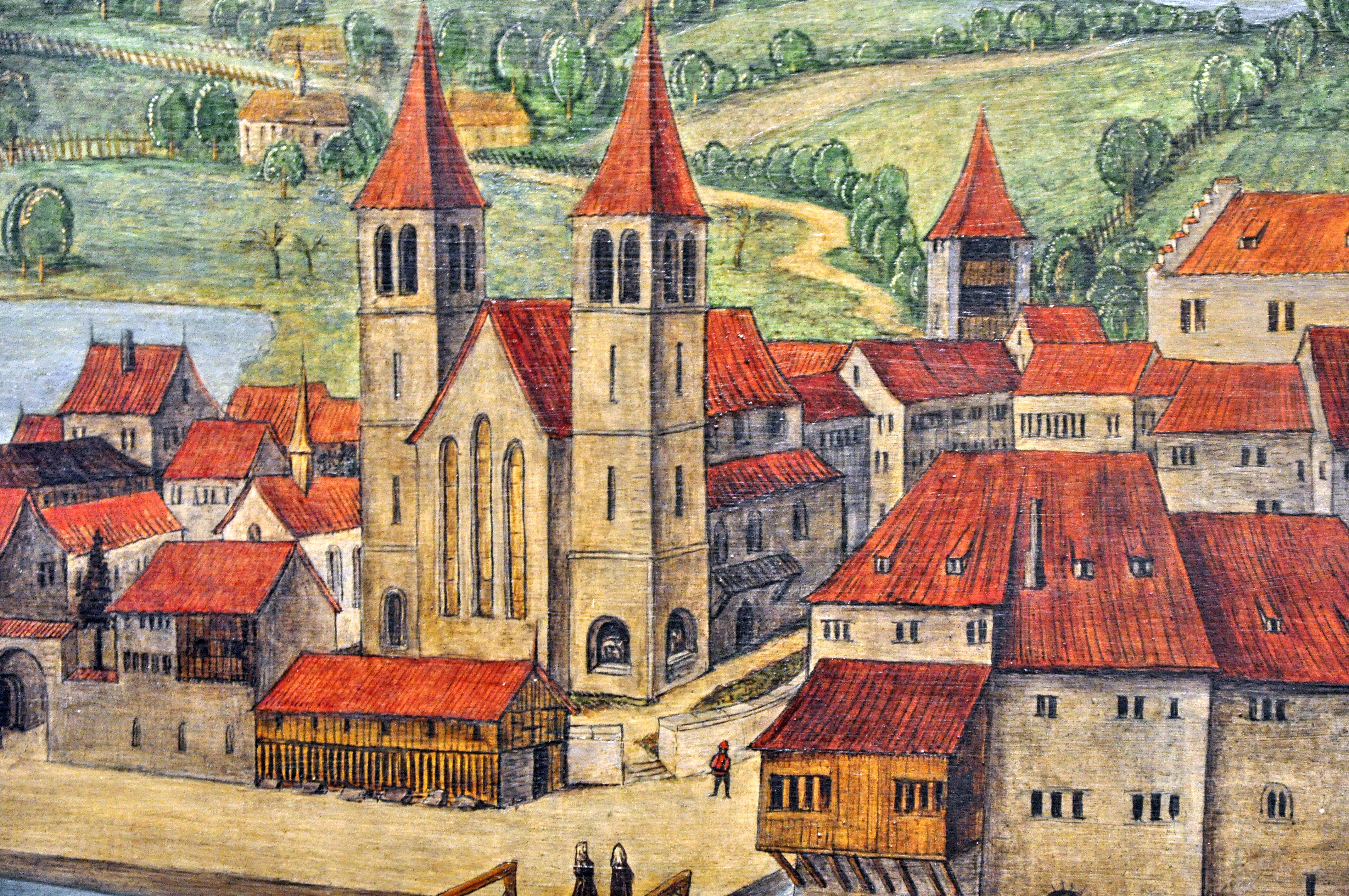 Category:|Category: auf der Replik der Altartafeln von Hans Leu im Baugeschichtlichen Archiv der Stadt Zürich im Haus zum Rech. Die Panoramansicht des linksseitigen Limmatufers – 'Standort' der BetrachterIn ist wohl der Karlsturm des Grossmünsters – von Hans Leu d. Ä. gilt als die älteste zuverlässige Darstellung der Stadt Zürich, Ende des 15. Jahrhunderts auf den Altartafeln im Grossmünster mit viel Liebe zum Detail festgehalten. Die originalen Tafeln sind heute im Landesmuseum ausgestellt, eine (vermutlich) 1:1 Replik ist im Stadtarchiv öffentlich zugänglich.